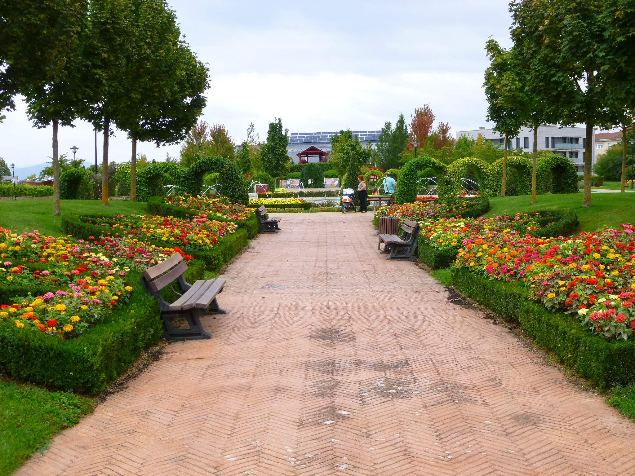 Parque de los Sentidos (Noáin, Navarra)